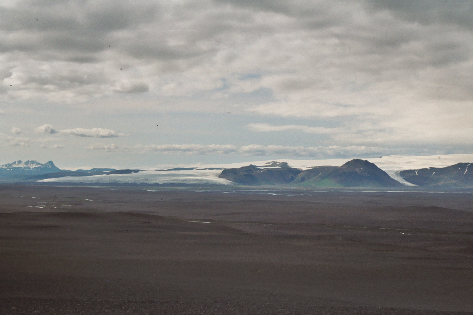 Vue sur la Þjórsá, région des hautes terres d'Islande. Il parait que cette région est une zone de nidification d'une espèce d'oie sauvage. La photographie a été prise en juillet 2004 par Johann Dréo (nojhan). Taille de l'image : 1536 x 1024, photographie numérisée à partir d'une pellicule argentique. Catégorie:Image d'Islande